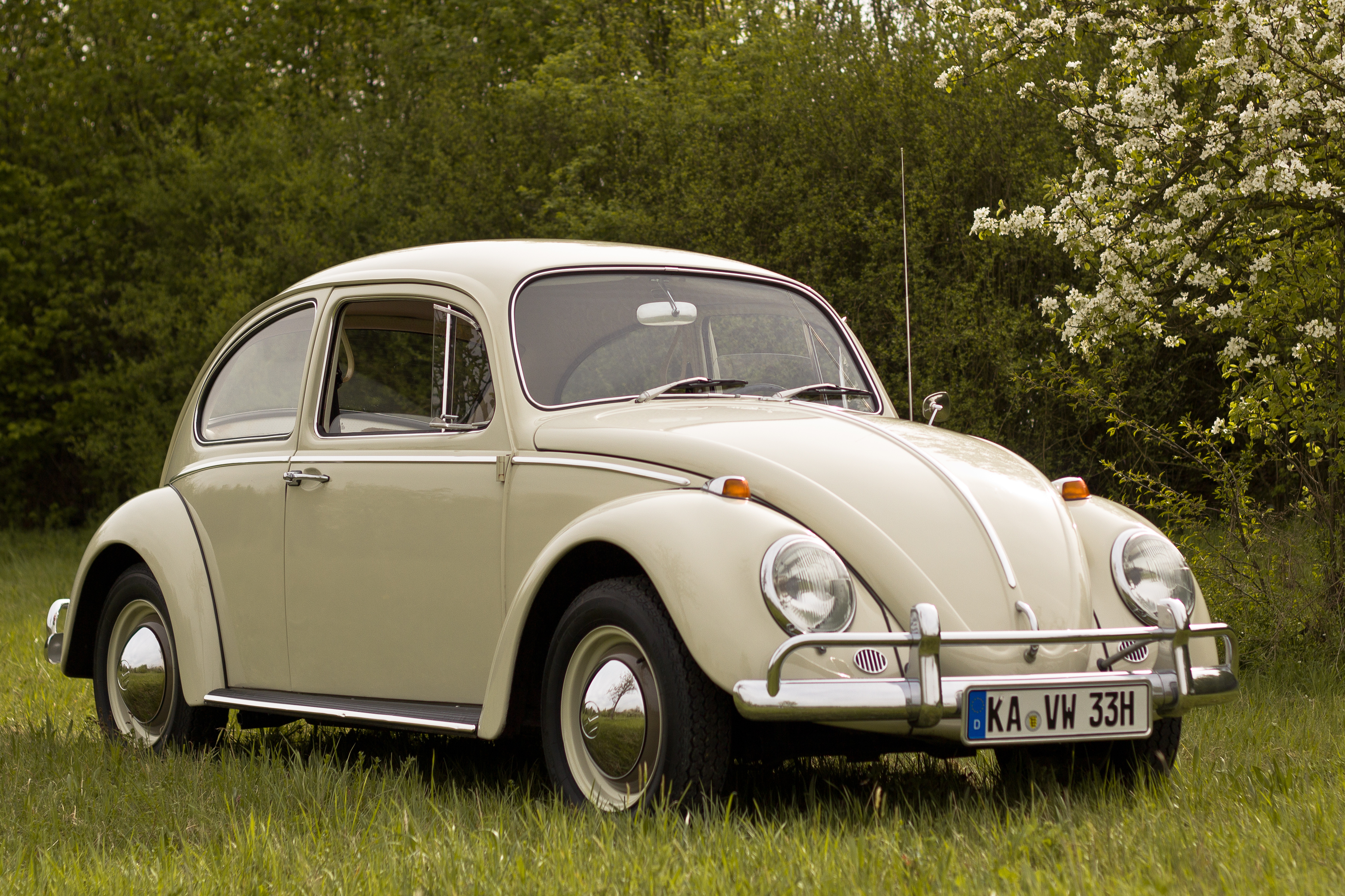 VW Käfer Baujahr 1966 mit originalen Export-Stoßstangen